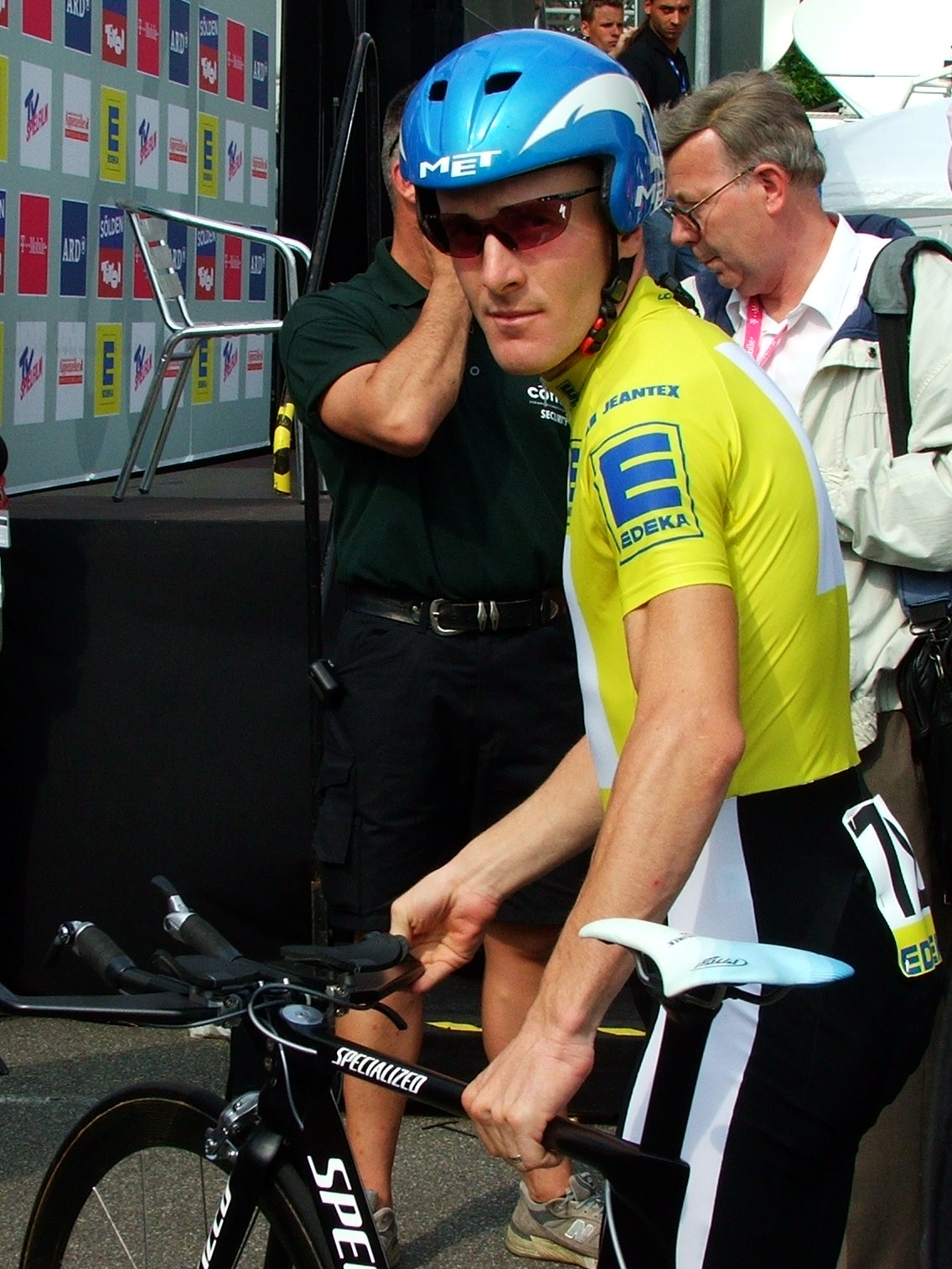 Levi Leipheimer kurz vor dem EZV der Deutschlandtour 2005